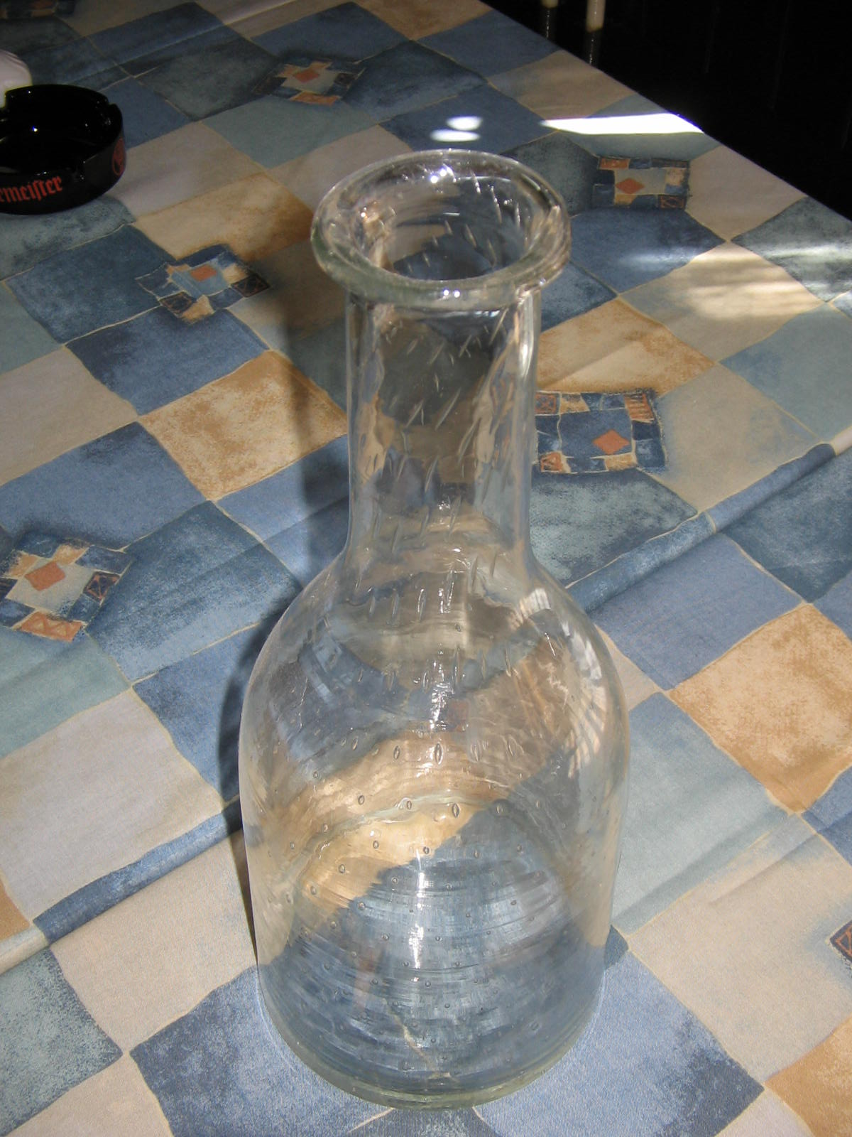 Traditionelle slowenische Flasche (Štefan) für zwei Liter Wein. Quelle: eigene Aufnahme 01 Okt. 2005 Fotograf: Janez Novak, Ljubljana, Slovenija